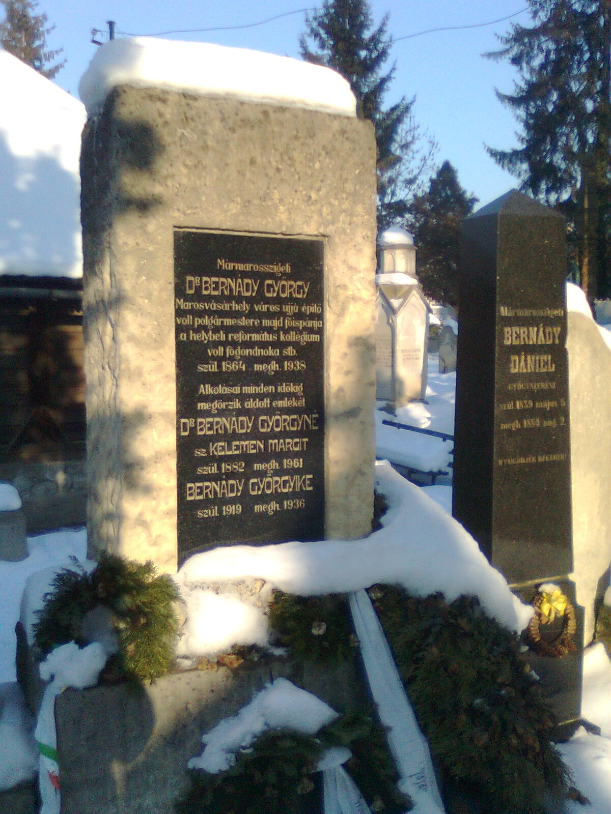 Bernády György híres marosvásárhelyi polgármester sírja (marosvásárhelyi református temető)